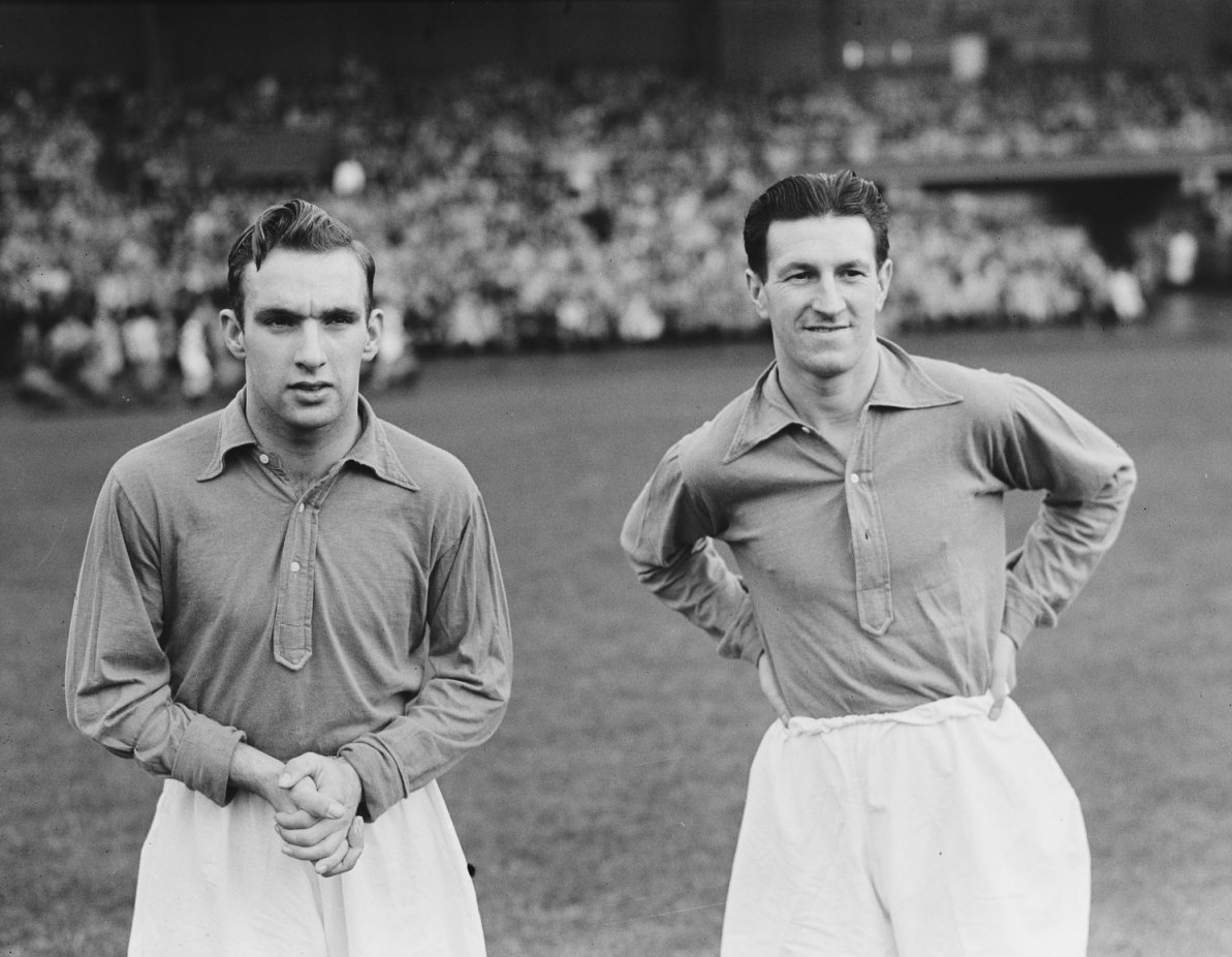 Nederlands elftal tegen Brentford 1-1. Rinus Bennaars (links) en Louis van den Bogert (rechts) in 1951